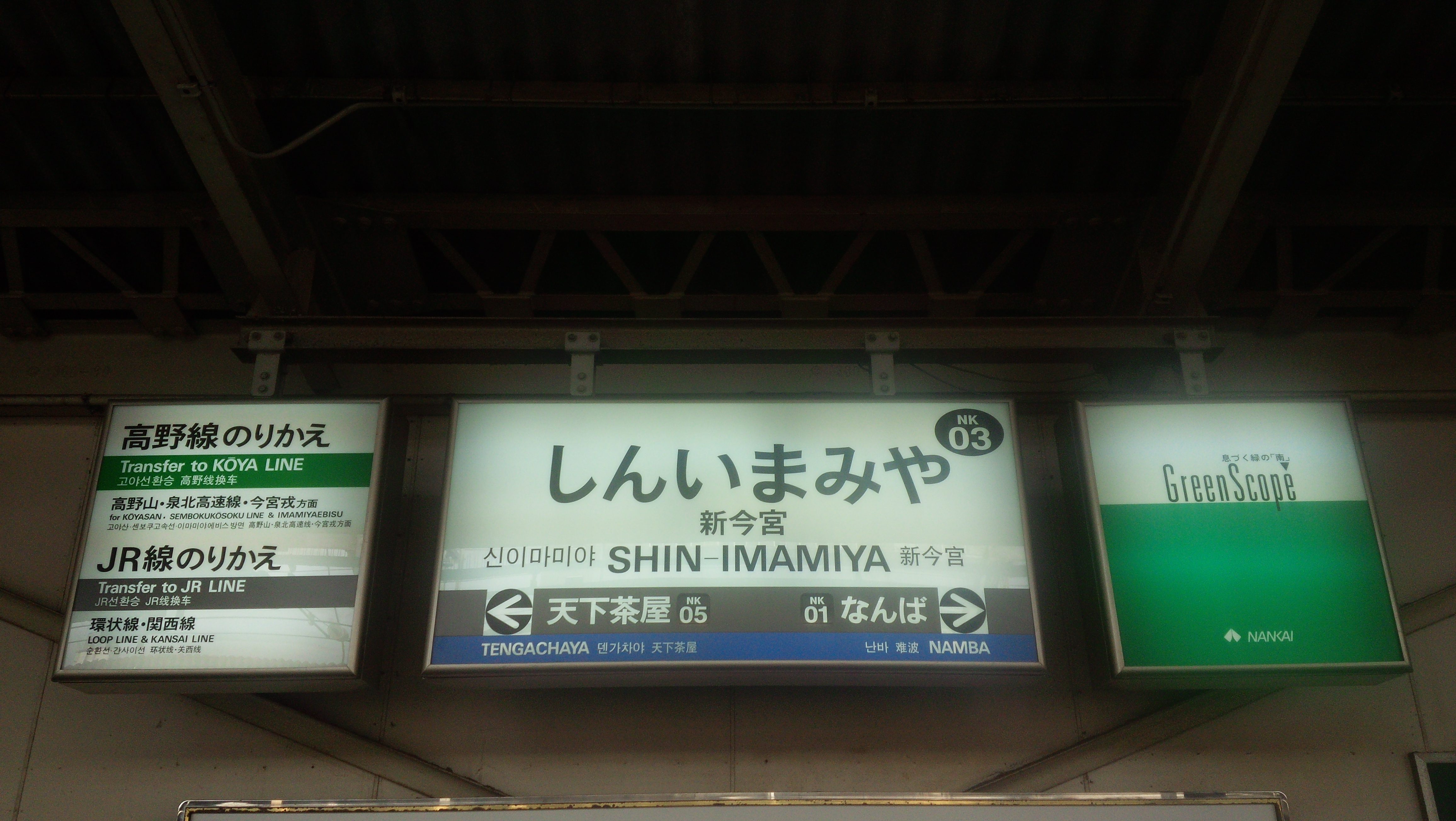 駅ナンバリングが入った南海新今宮駅の駅名標